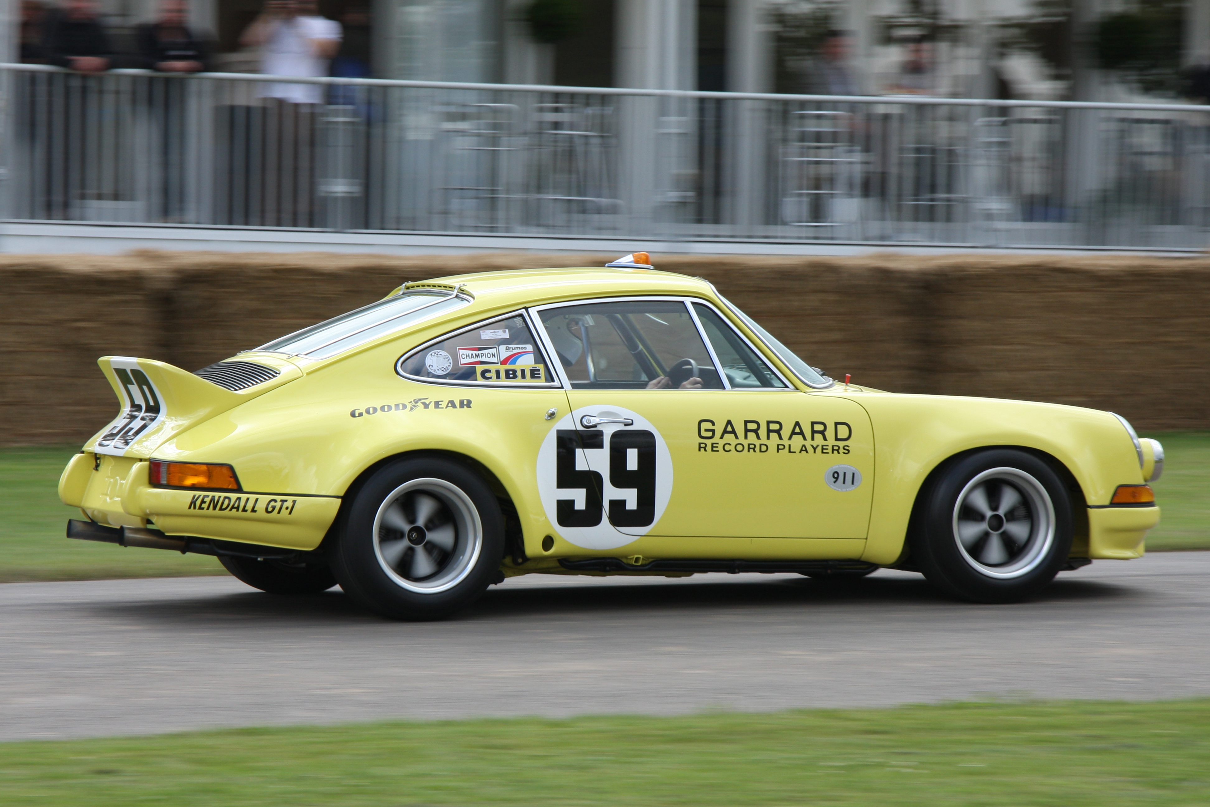 Built 1973. 2.8 litre flat 6